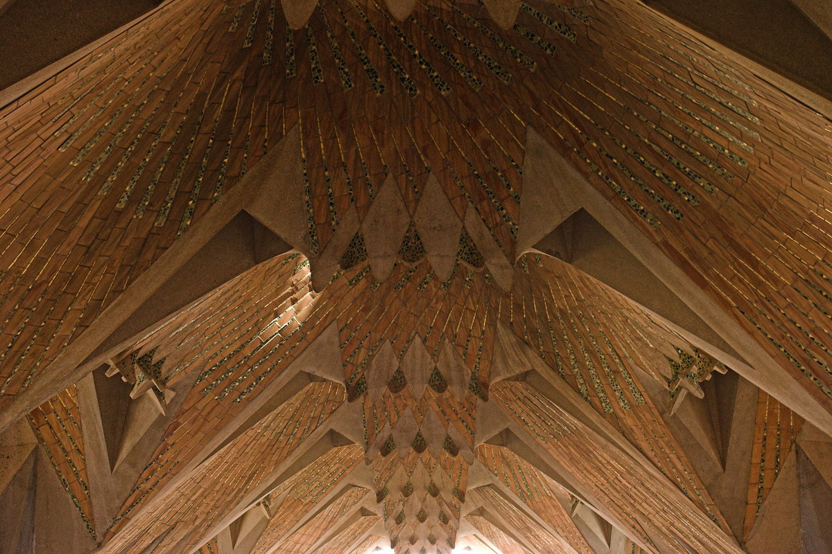 Volta central vista des del creuer a vista des de la base del cimbori.(Sagrada Familia-Barcelona-Catalunya)